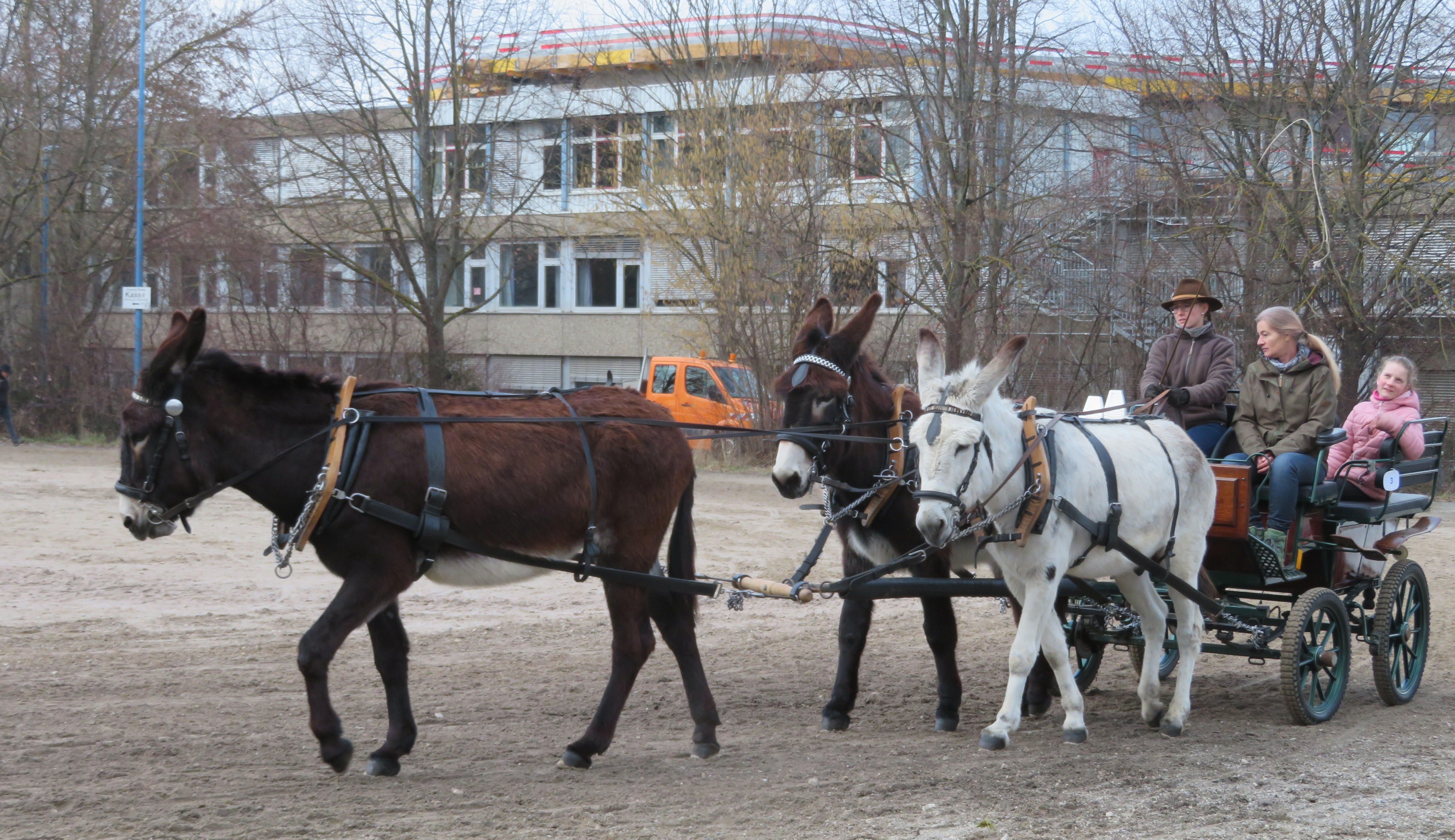 Bernhausener Pferdemarkt 2019